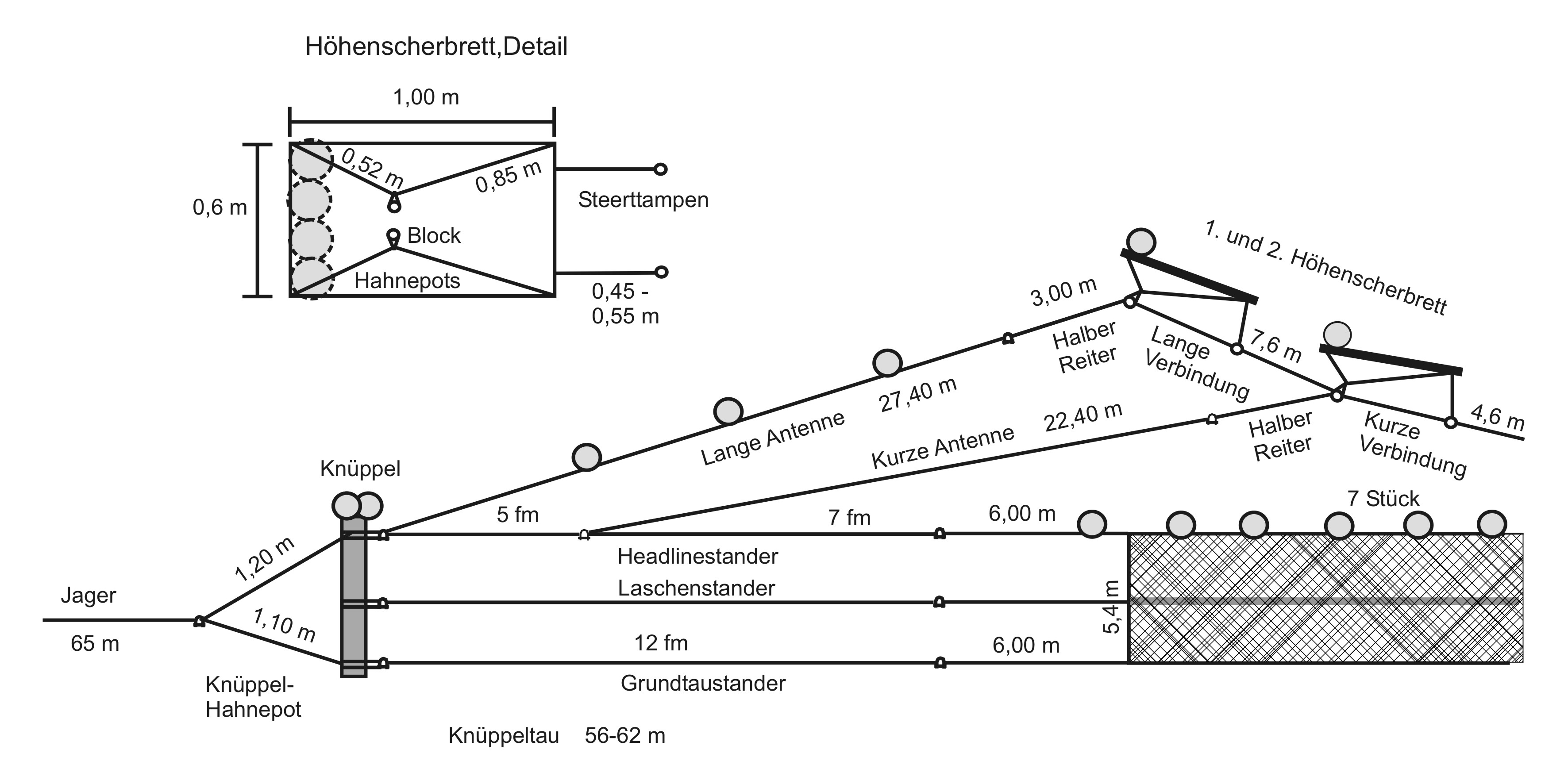 Herings-Grundschleppnetz der Loggerfischerei, wie üblich 1965 auf dem Logger Saxnot, SG7. Seitenansicht, schematisch, mit einzelnen Bestandteilen, Leinen, Vermaßung. Angaben in m bzw Faden (fm), 1fm = 1,8288 m. Gesamtansicht dazu siehe Herings-Grundschleppnetz.